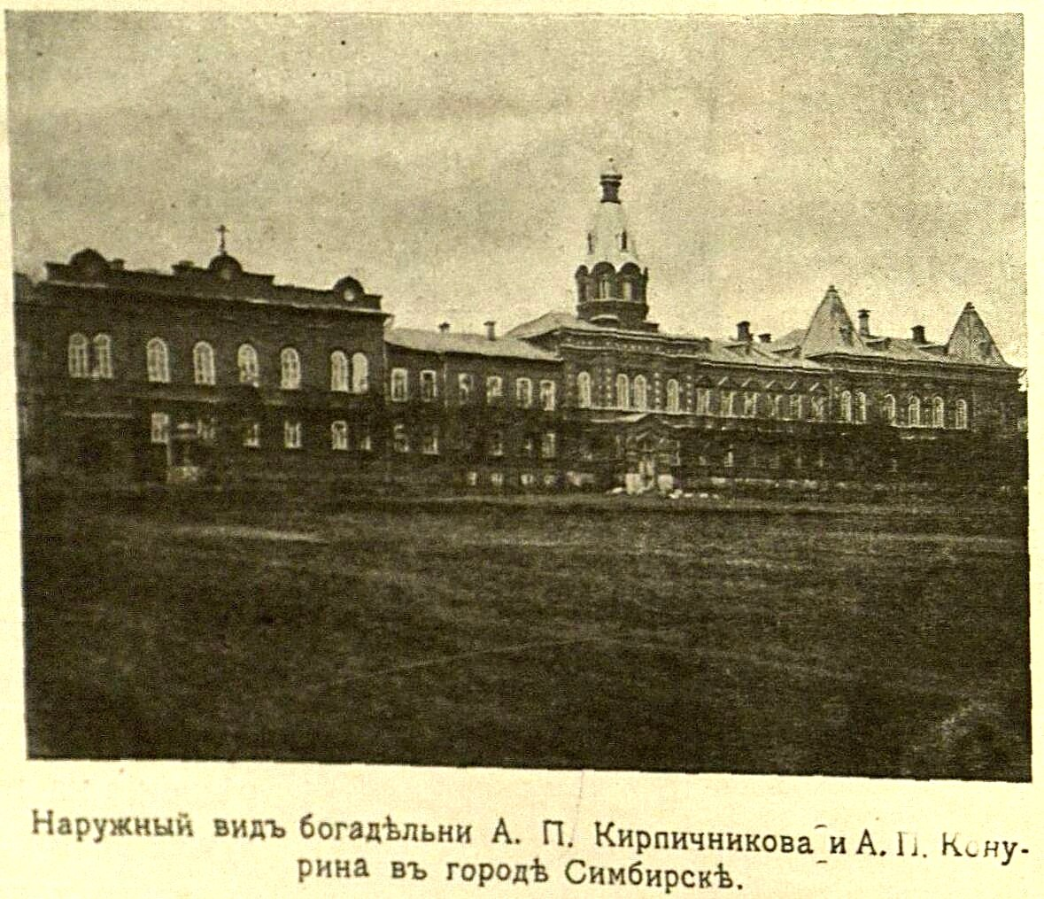 Симбирск, Кирпичниковский приют (богадельня).